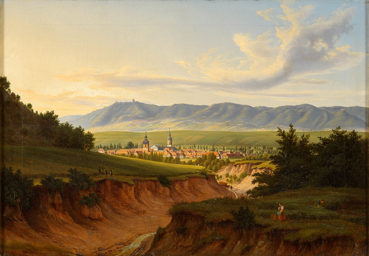 Ansicht von Roßla (am Harz). Signiert. Datiert 1841. Öl auf Leinwand, 44 x 64 cm